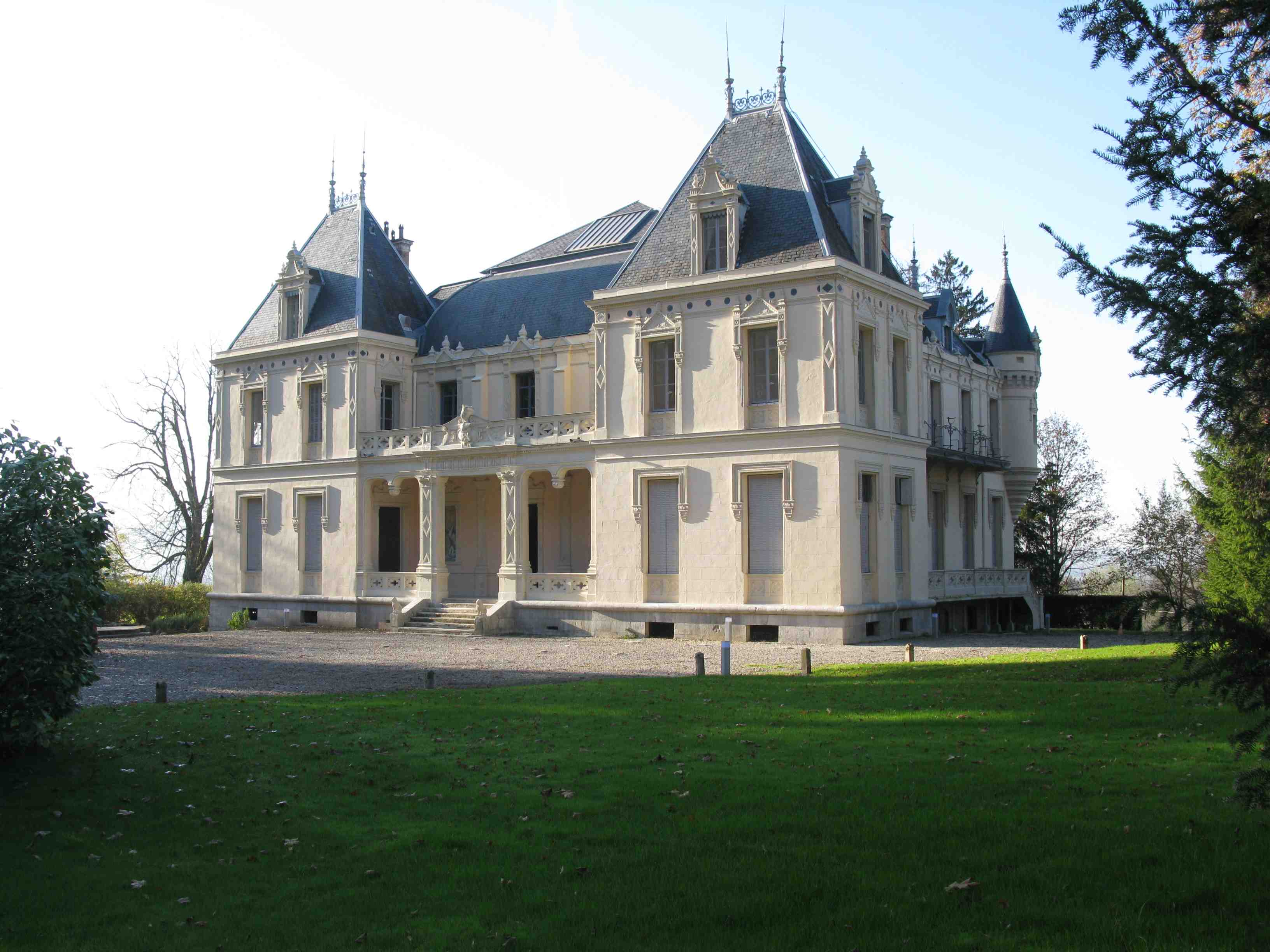 Château de Saint-Béron (Inscrit) .